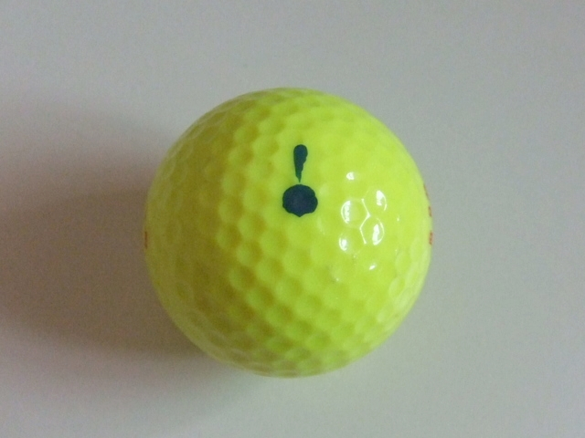 삼성어린이박물관의 로고가 새겨진 노란색 골프공. 로고의 색은 실제와 다릅니다.